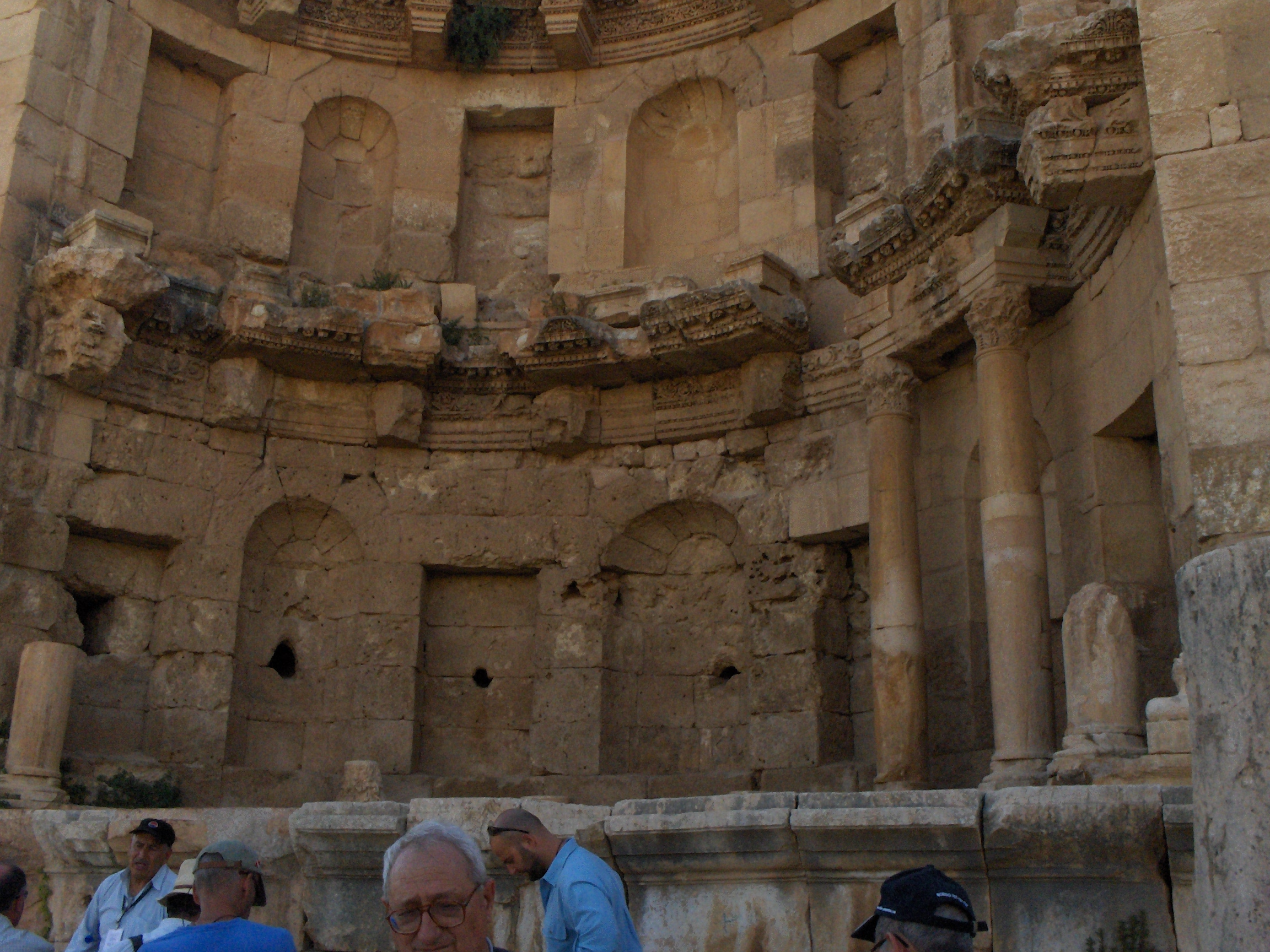 Il ninfeo di Jerash, Giordania